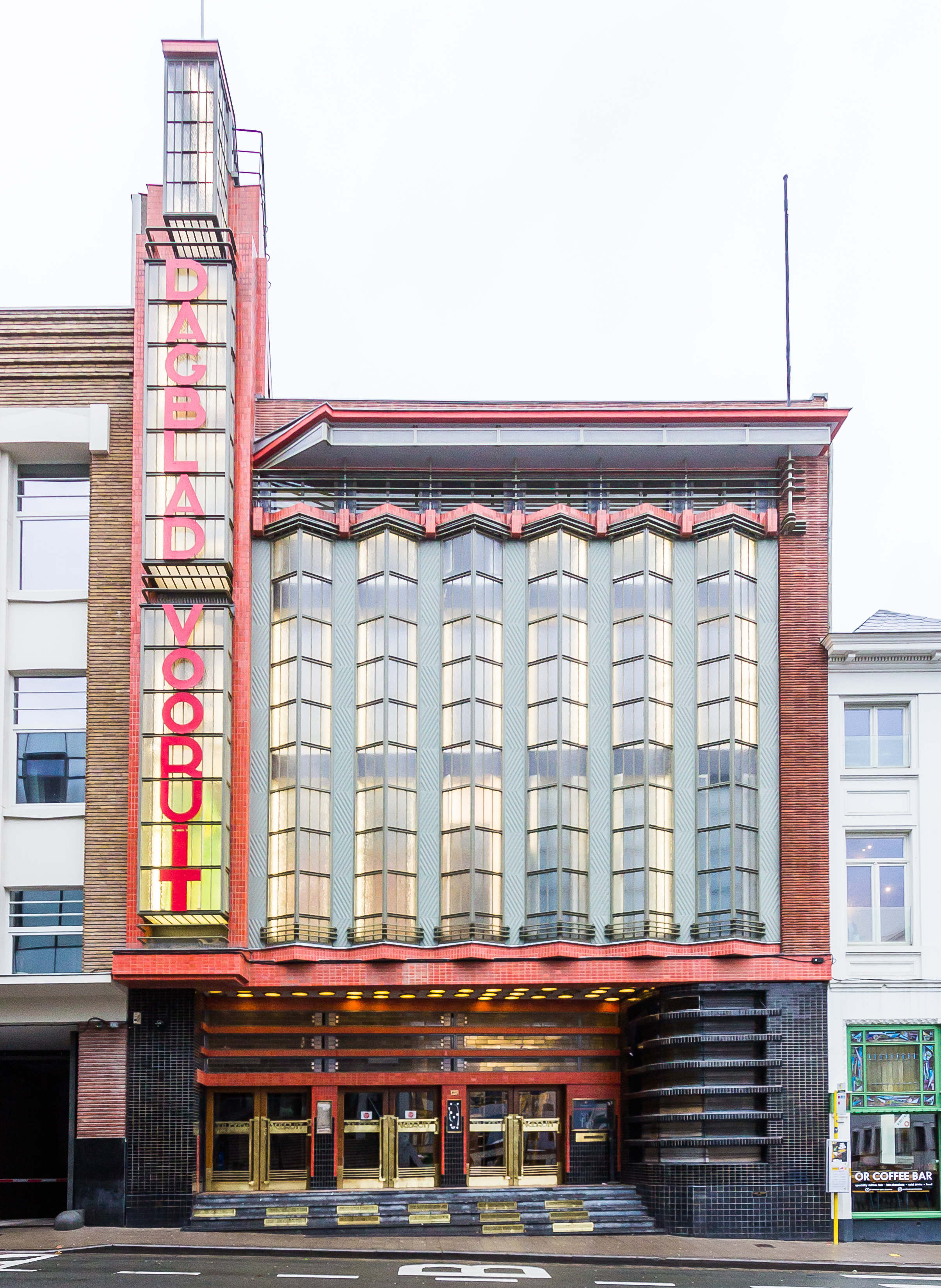 Drukkerij/Voormalige zetel dagblad Vooruit, Sint-Pietersnieuwstraat 128, Gent